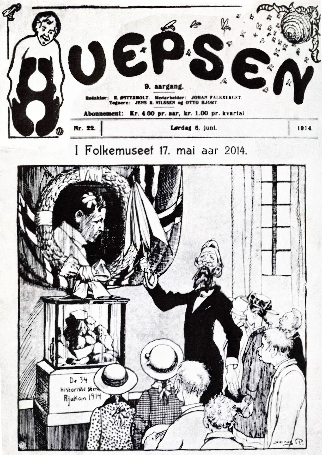 forside på Hvepsen 5. juni 1914